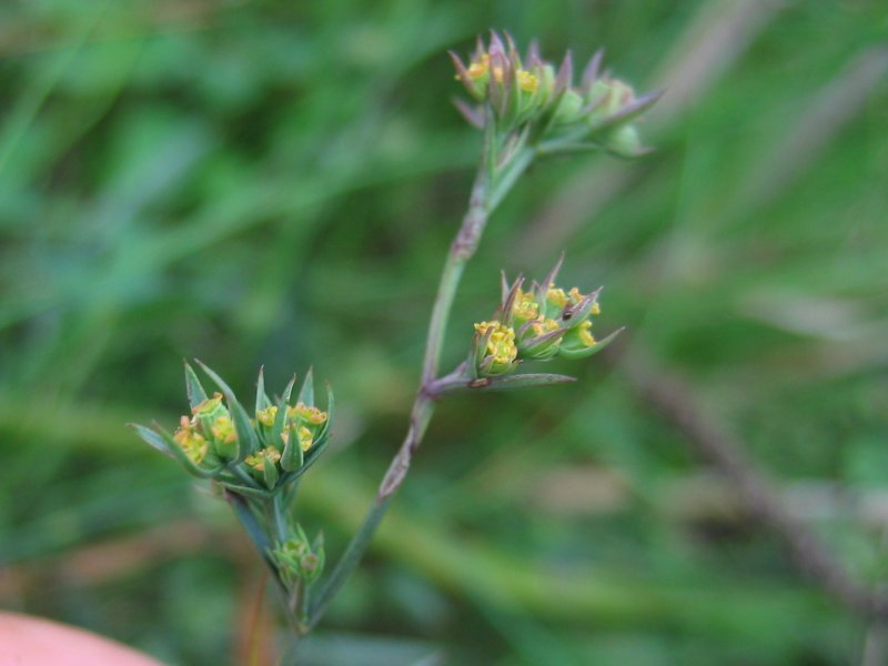 Salz-Hasenohr Bupleurum tenuissimum, Wismarbucht